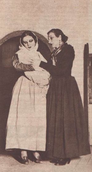 Las actrices Margarita Xirgu y Pilar Muñoz en una escena del estreno de la obra de teatro Yerma, de Federico García Lorca